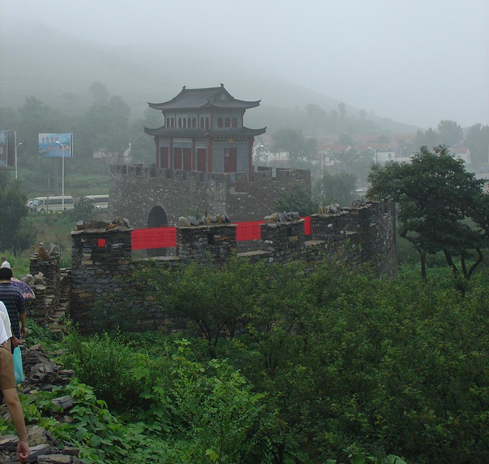 齐长城遗址，远为锦阳关